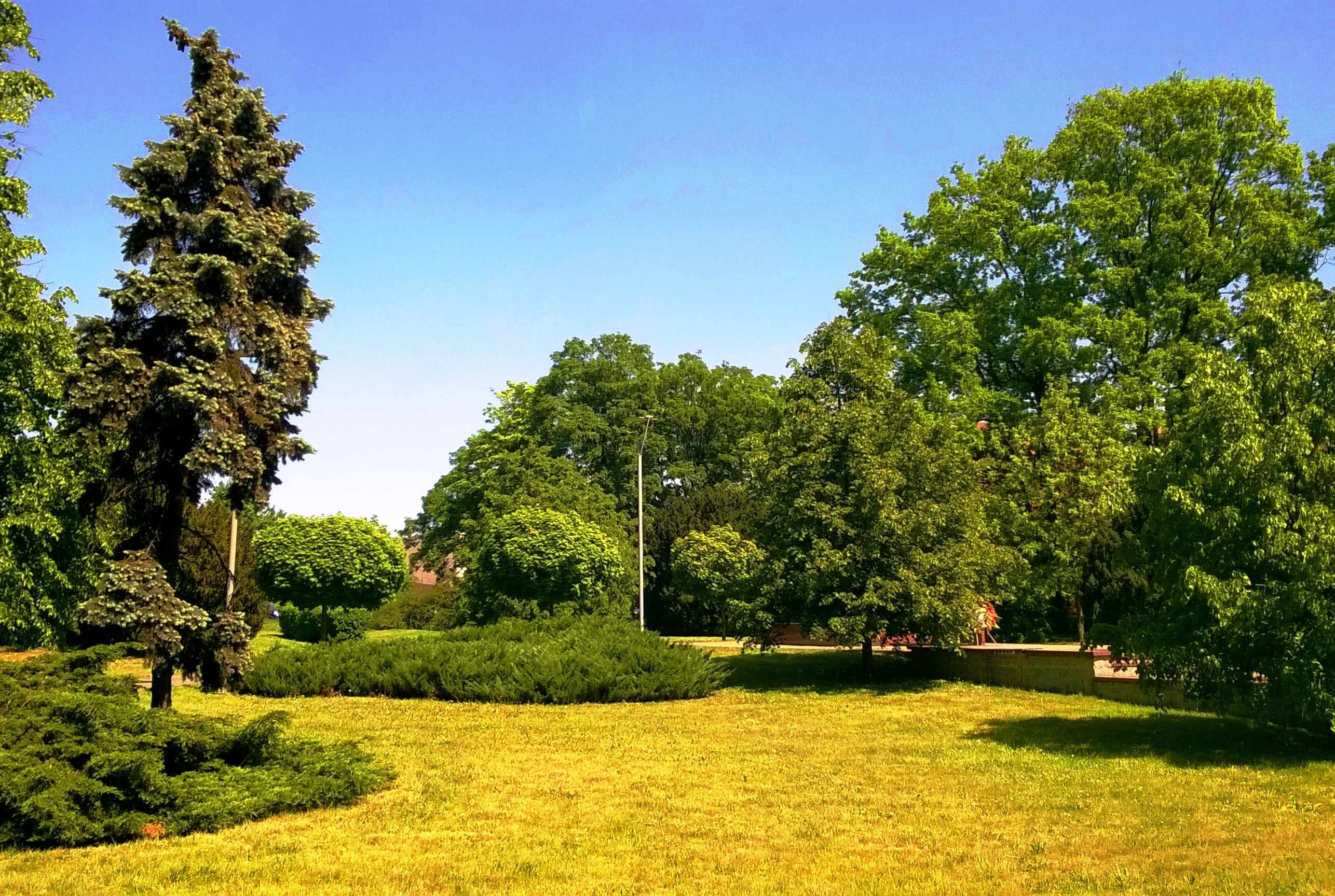 Jordanki w Toruniu22